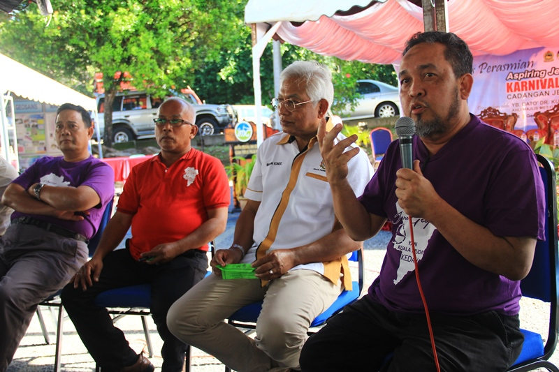 Karnival Promosi Jerai Geopark 2016